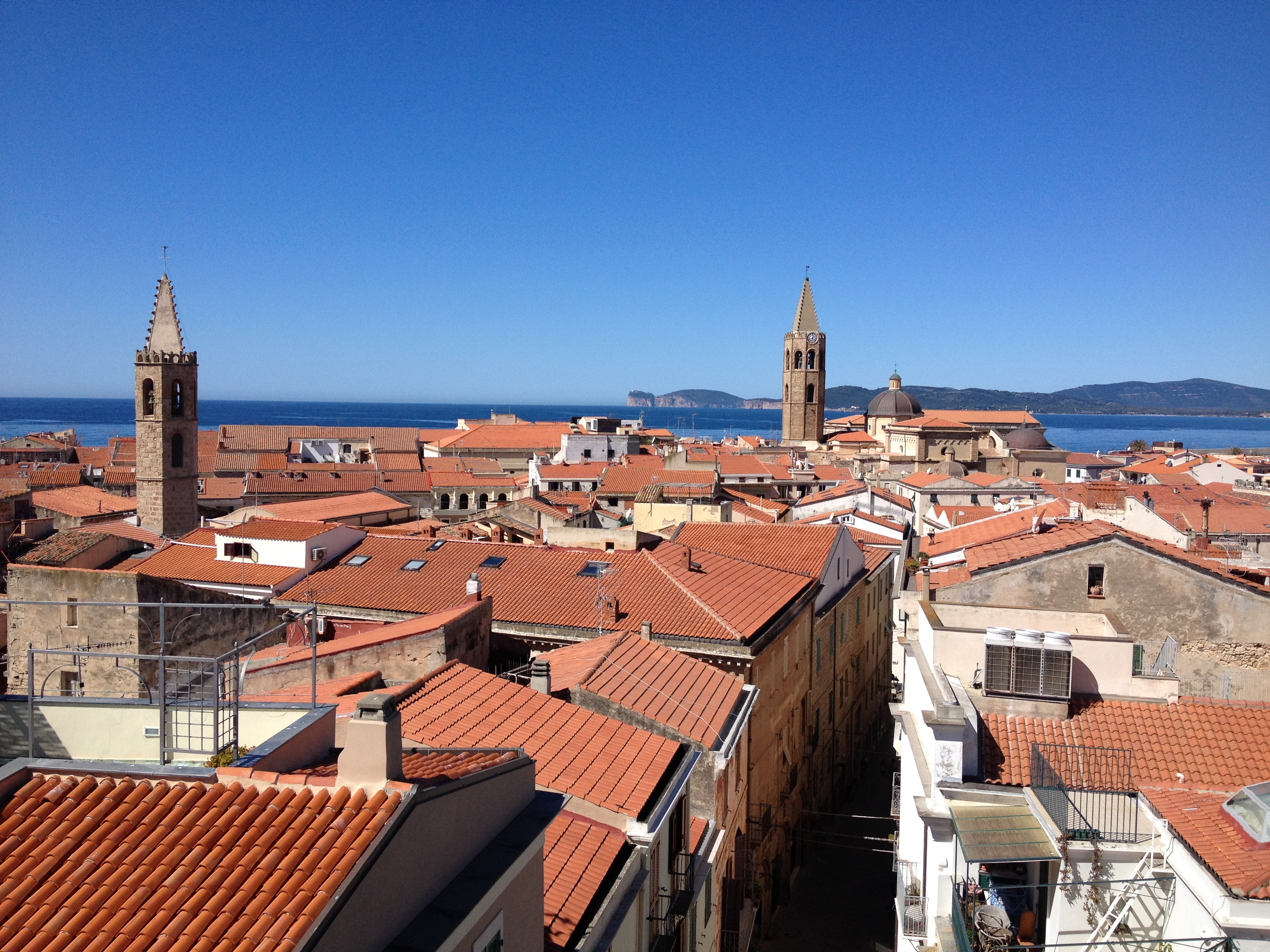 View from Porta Terra, l'Alguer.